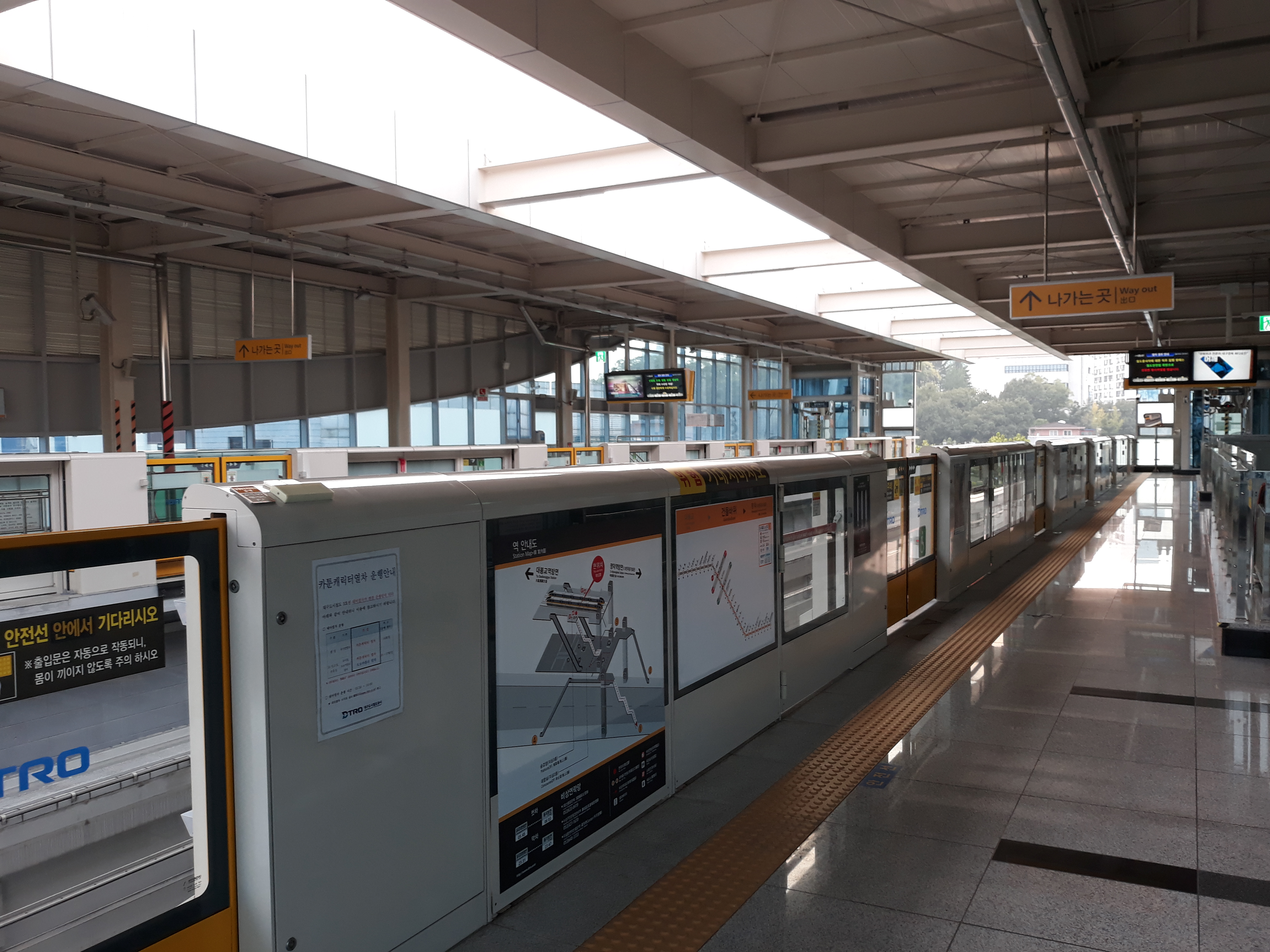 대구 도시철도 3호선 건들바위역 칠곡경대병원 방면 승강장